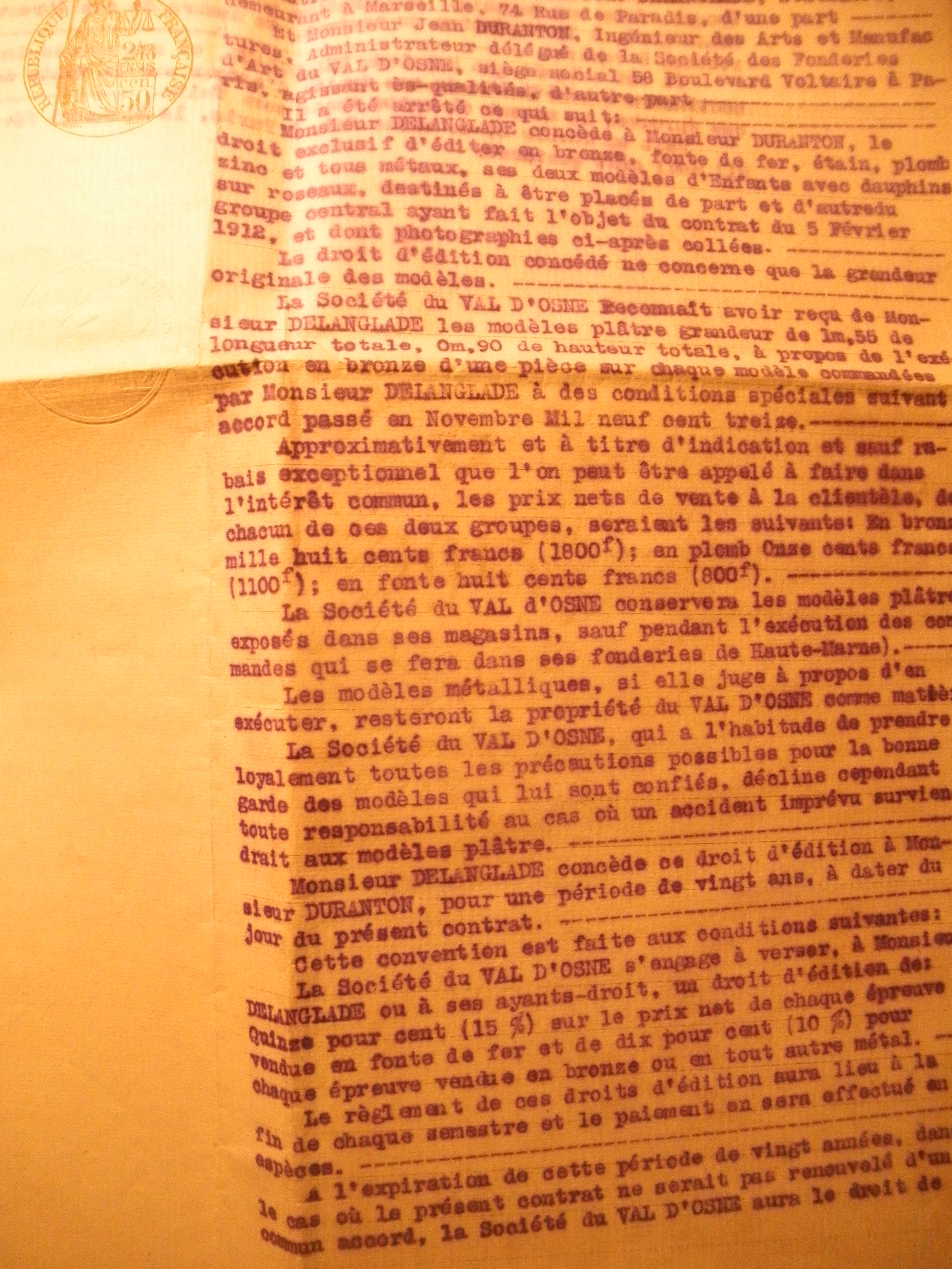 1910 contrat Bonnasse Val d'Osne